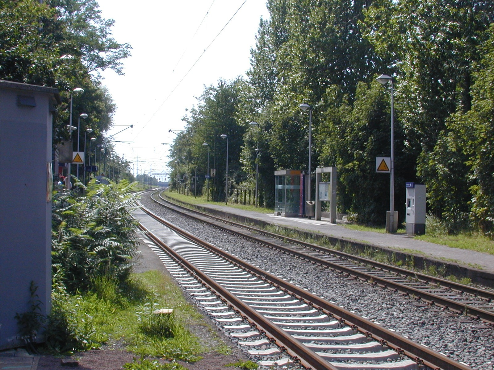 Bahnhof Dortmund-Kirchderne